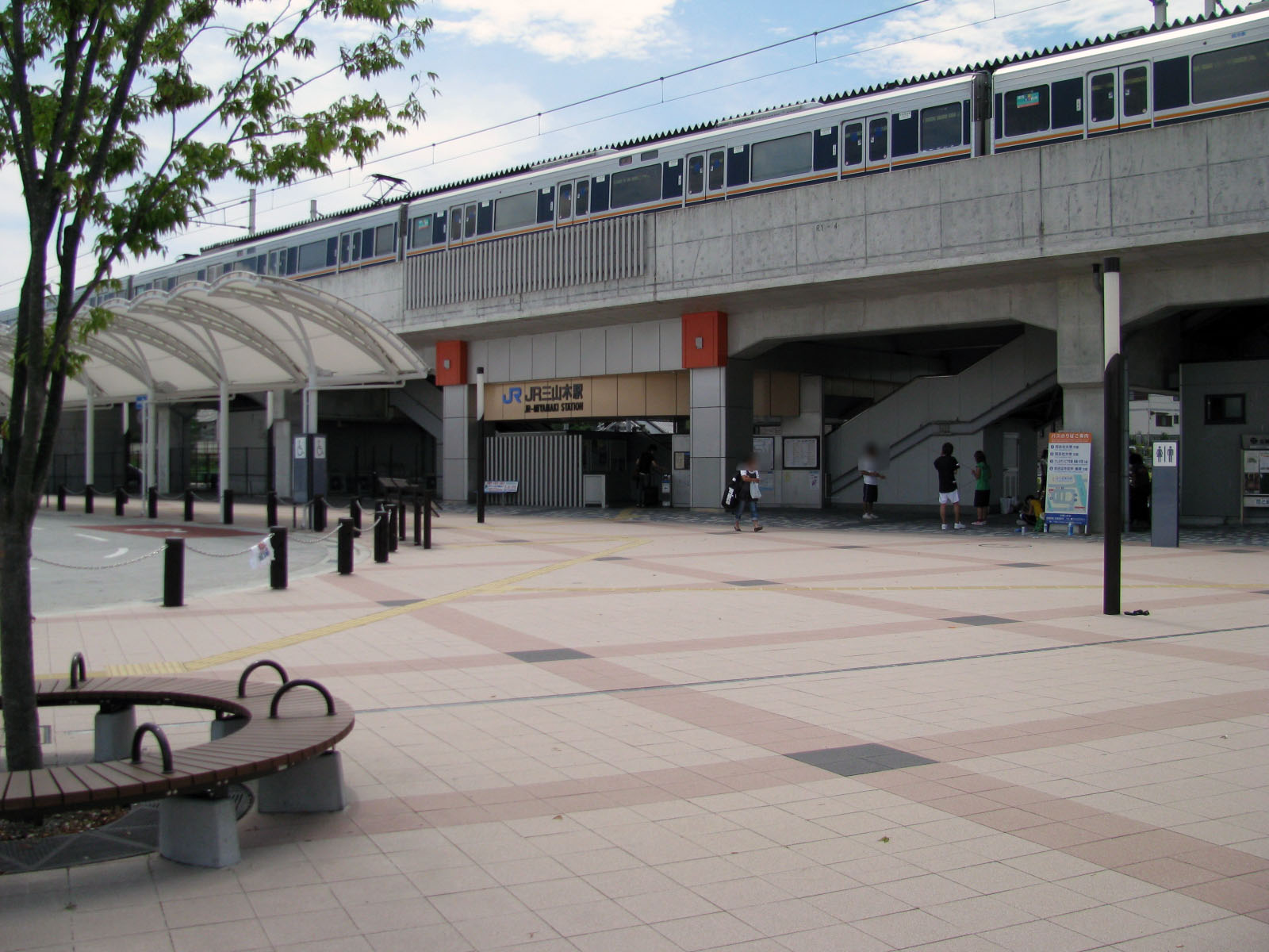 JR学研都市線JR三山木駅